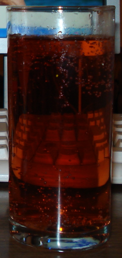 Напиток "Ягуар" в прозрачном стакане